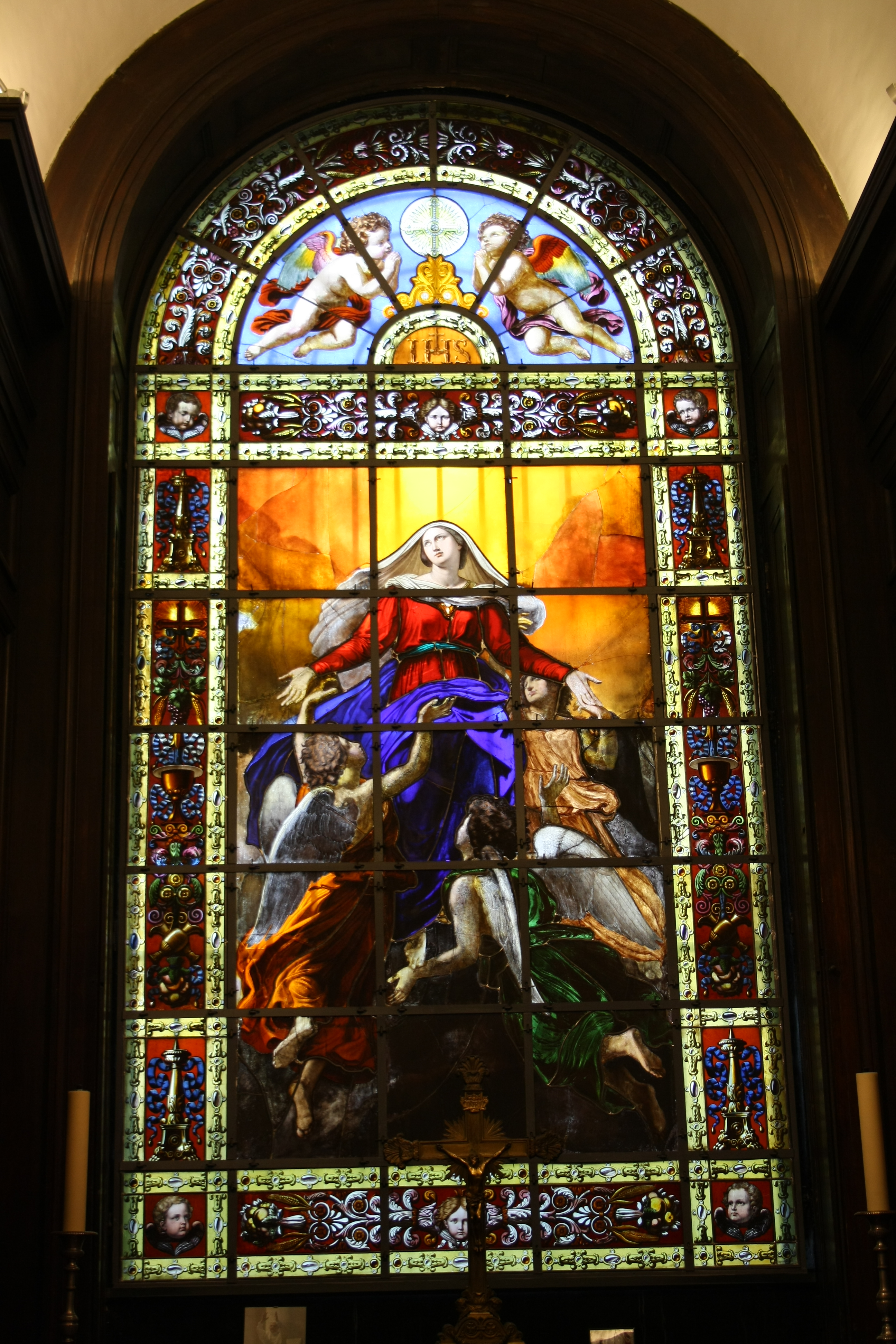 L'Assomption. Vitrail de l'église Notre-Dame-de-Lorette à Paris (75). Carton de Pierre Claude François Delorme ; vitrail de la Manufacture de Sèvres (Vatinelle Ainé) ; 1829[1]